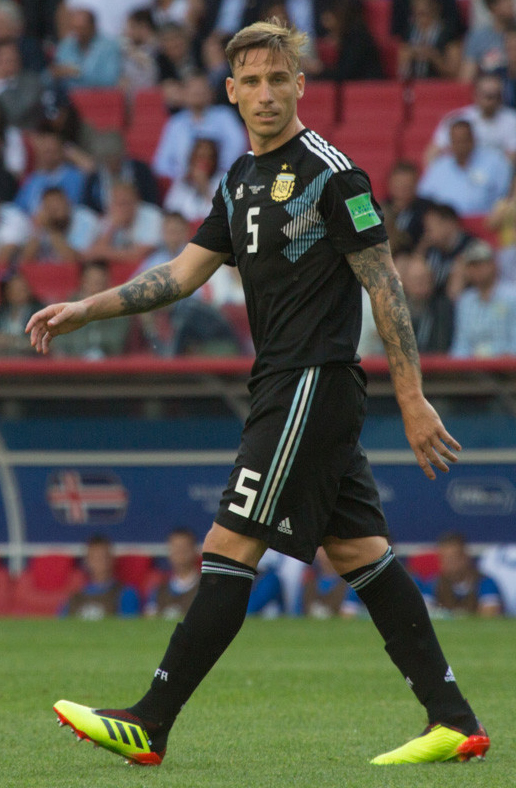 Месси и Ко не смогли обыграть неуступчивых исландцев